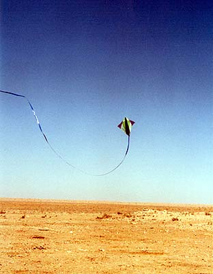 Lenkdrachen in der tunesischen Sahara. Fotografiert und gesteuert von Katharina Bleuer (was gar nicht so einfach ist :-) im Dezember 2001. Bild darf selbstverständlich weiterverwendet werden, wenn die Autorin genannt wird.